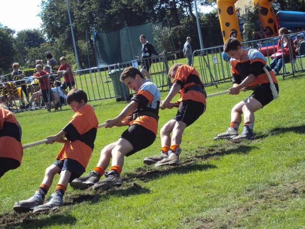 berketrekkers in actie